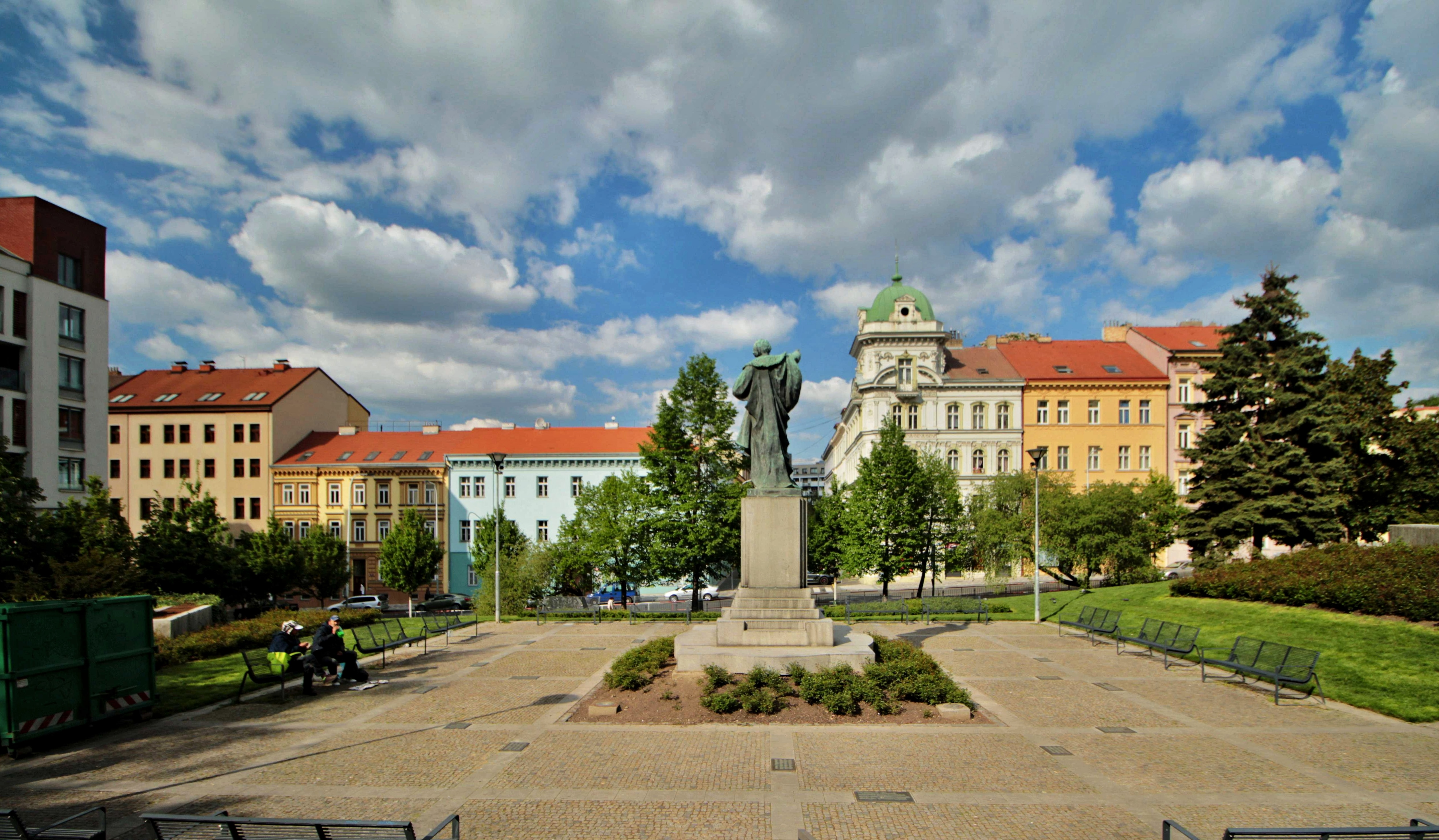 Žižkov náměstí Barikád